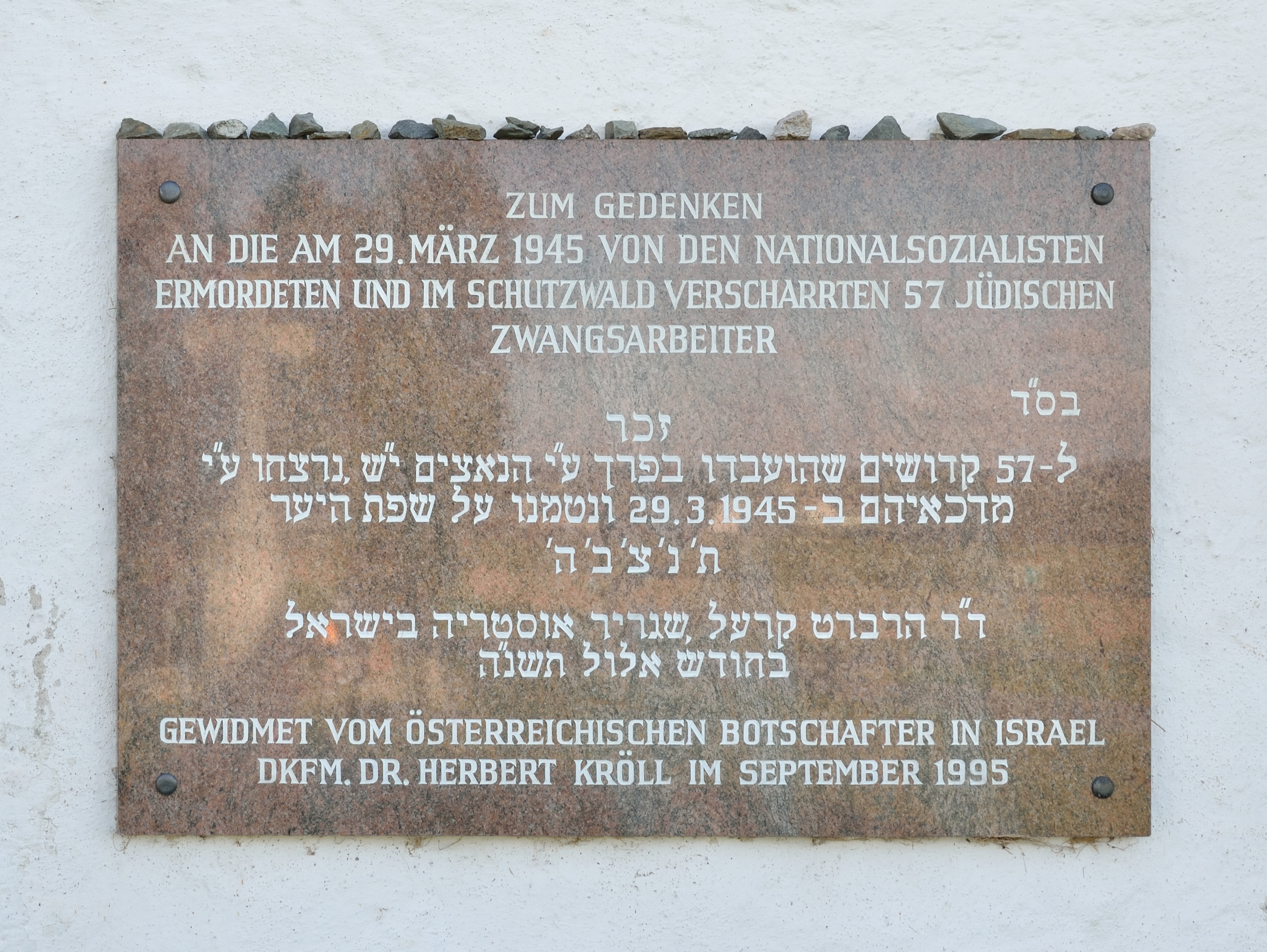 Gedenktafel für im Jahr 1945 ermordete jüdische Zwangsarbeiter an der Pfarrkirche hl. Martin, Deutsch Schützen.